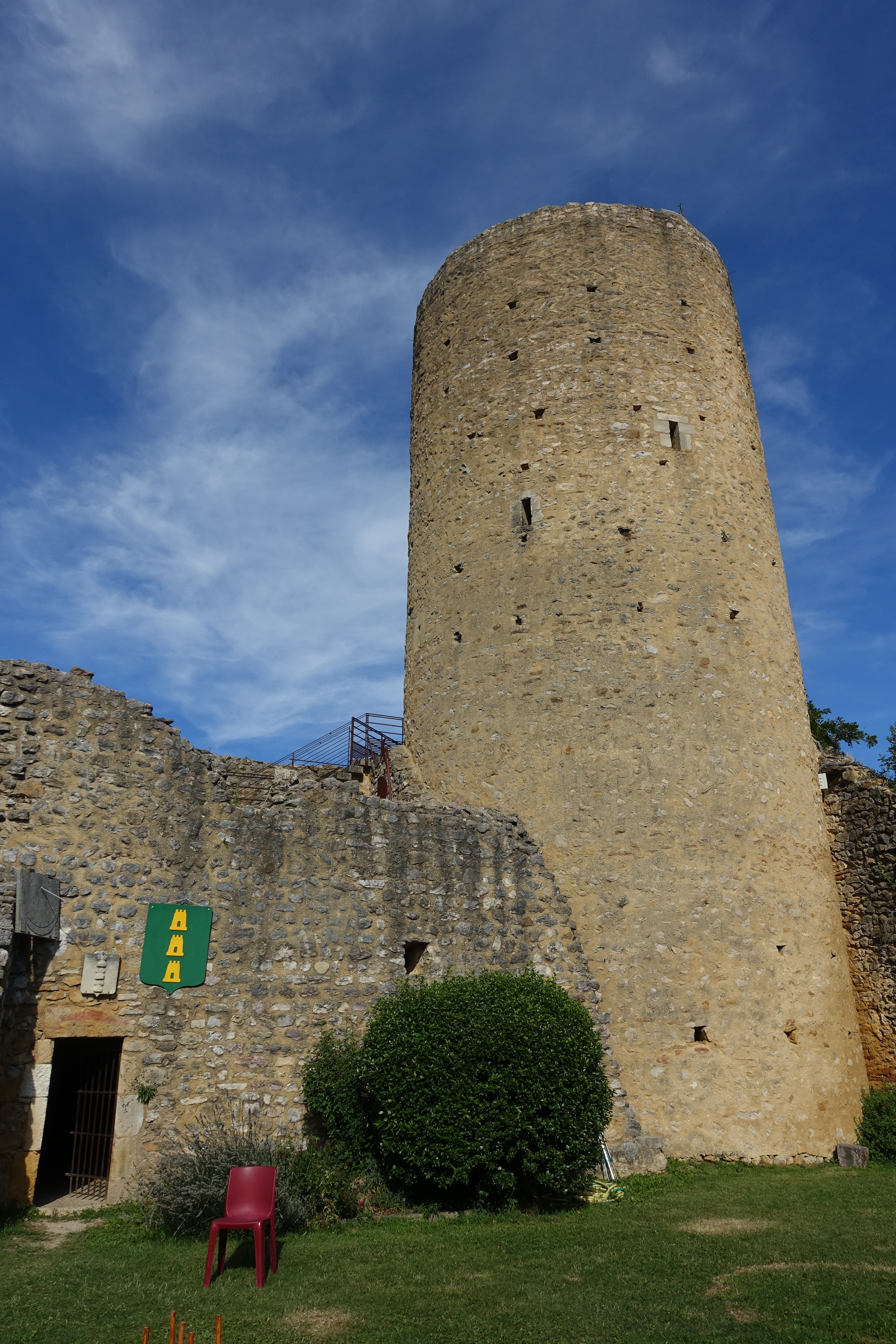 Donjon restauré du Château d'Aurignac, 13ème siècle